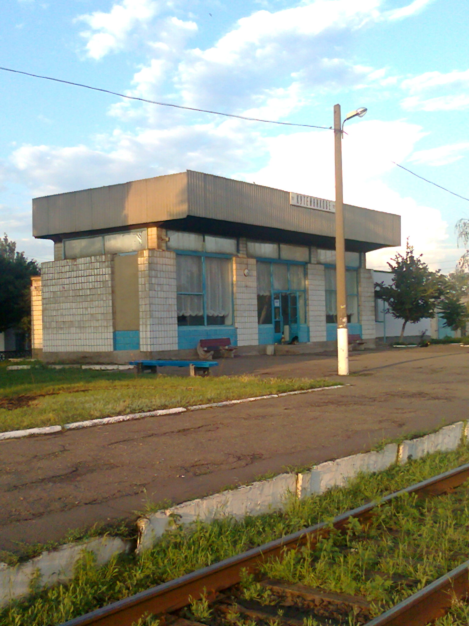 Вокзал станции Кутейниково Донецкой железной дороги